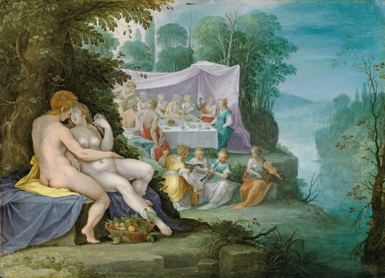 Die Hochzeit von Peleus und Thetis.